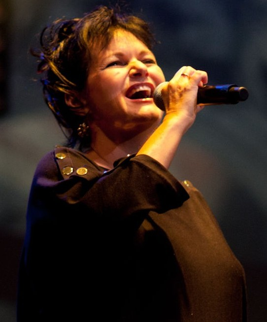 Maurane à la Fête de la Fédération Wallonie-Bruxelles.